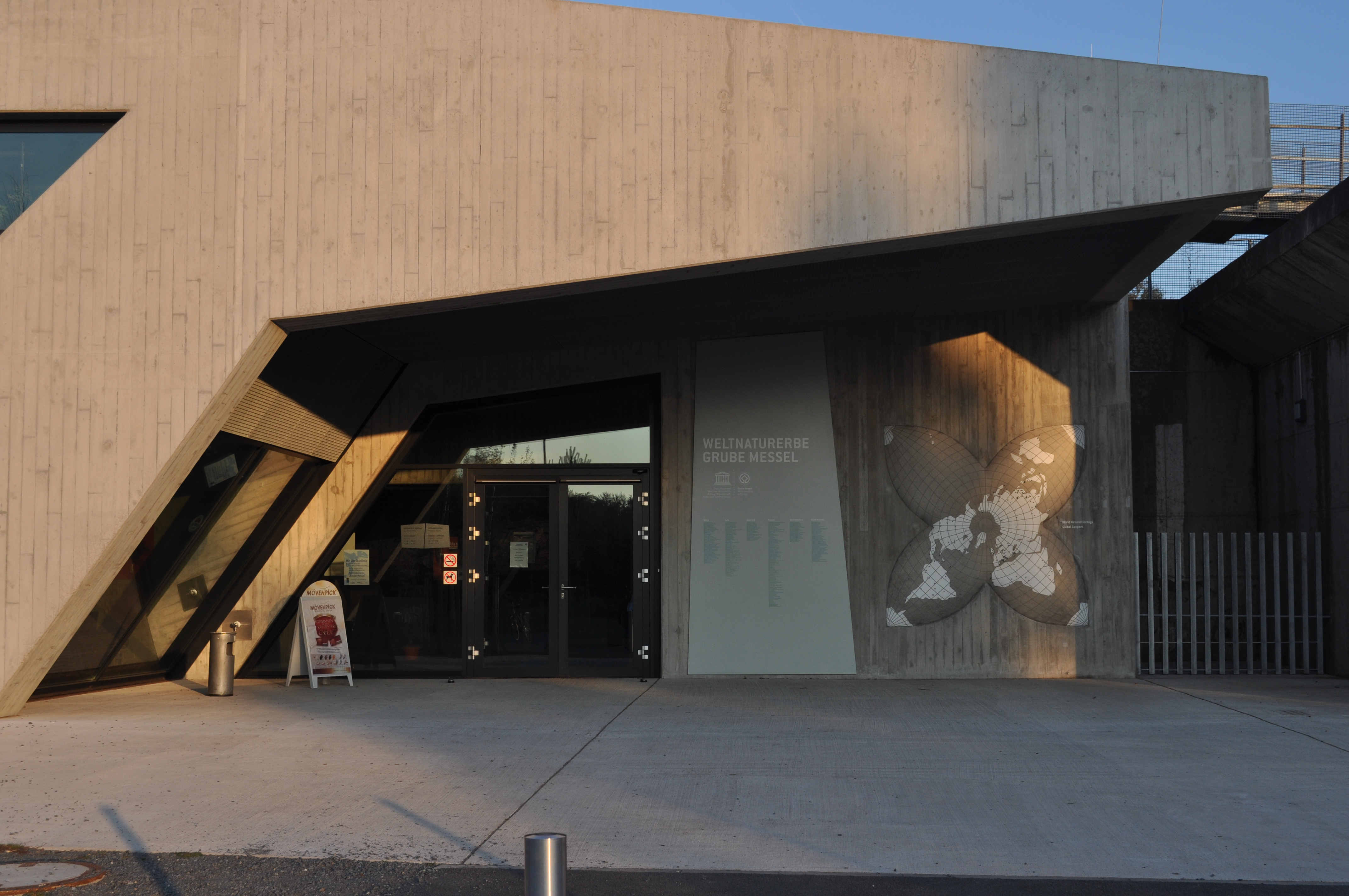 Acceso a la Casa del Visitante en el yacimiento de fósiles de Messel.